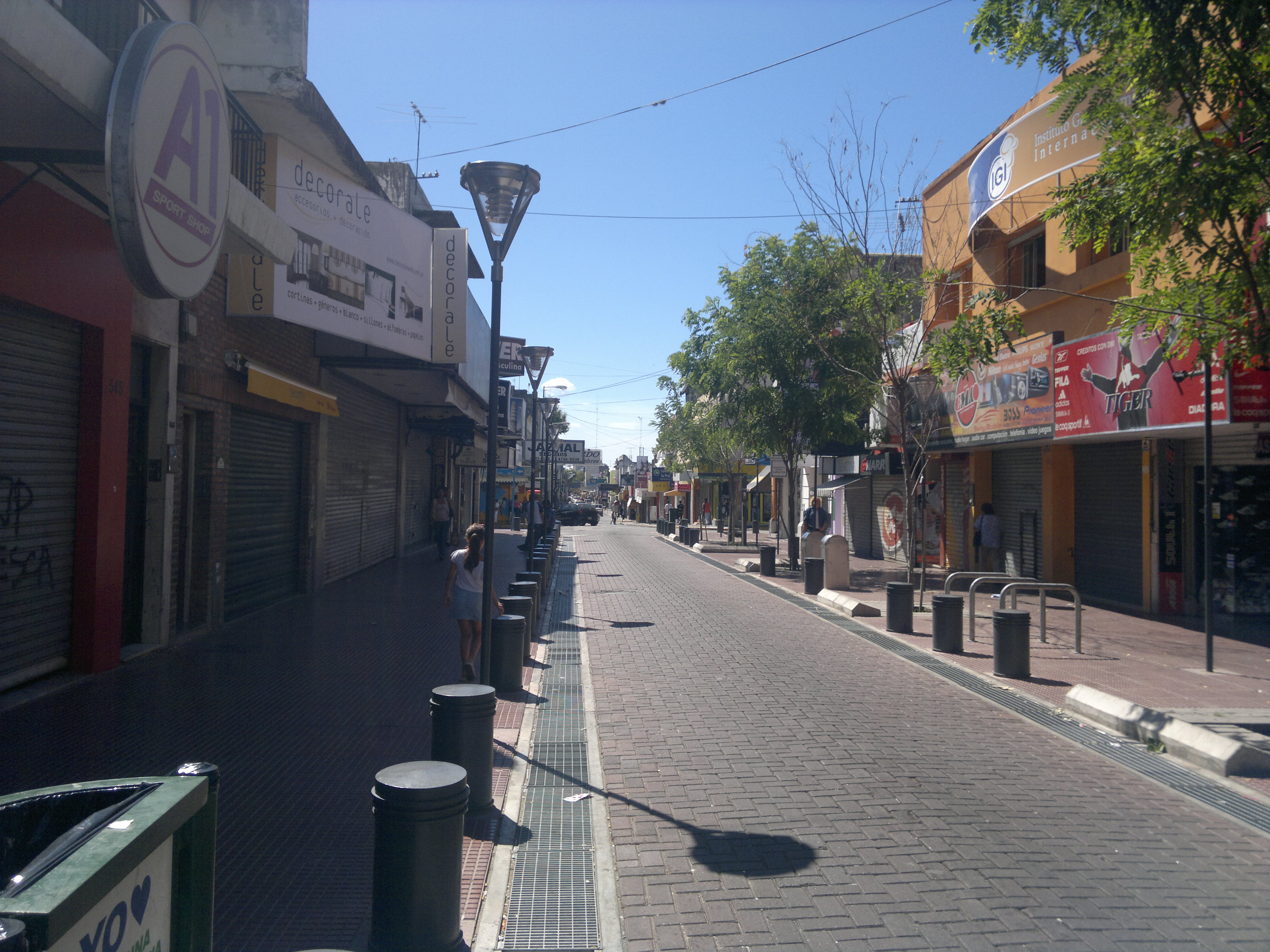 Peatonal Constitución